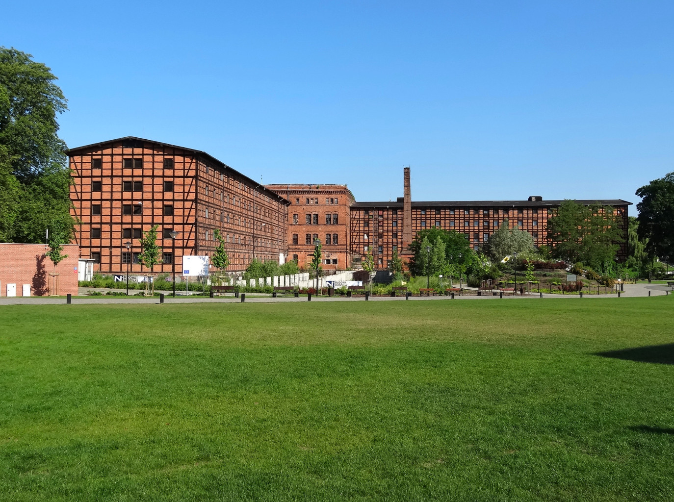 Młyny Rothera (zbud. 1850 r.) na Wyspie Młyńskiej w Bydgoszczy